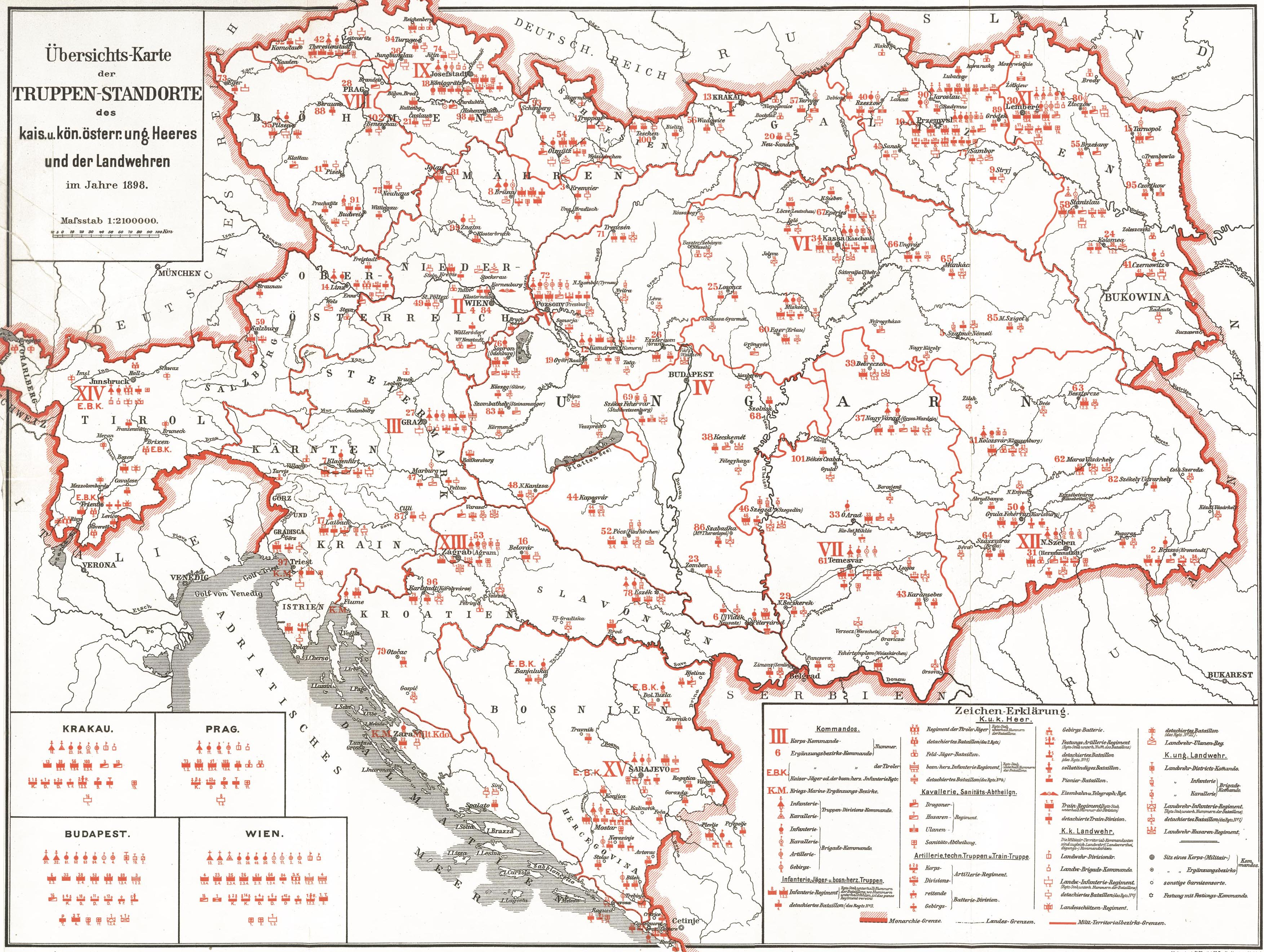 Garnisonen der k.u.k Armee (Stand 1898)